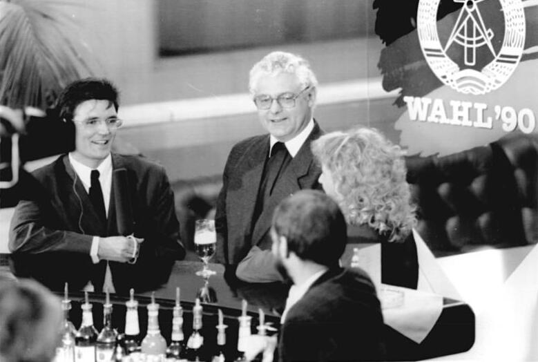 ADN-ZB Settnik-Tele 18.3.1990 Berlin: Wahl 90 Im Wahlzentrum des Palastes der Republik war auch Monsignore Dr. Karl-Heinz Ducke, einer der drei Moderatoren des Runden Tisches, zu Gast.